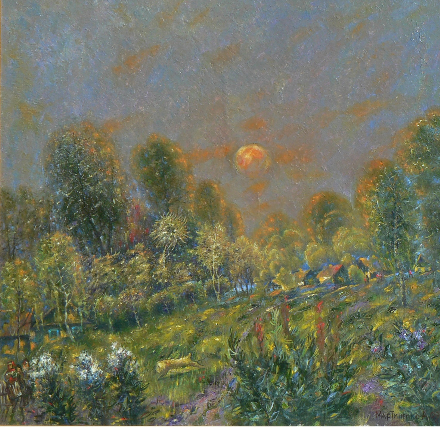 «Вечір на Поліссі» (2009). Автор Мартиненко Анатолій Іванович